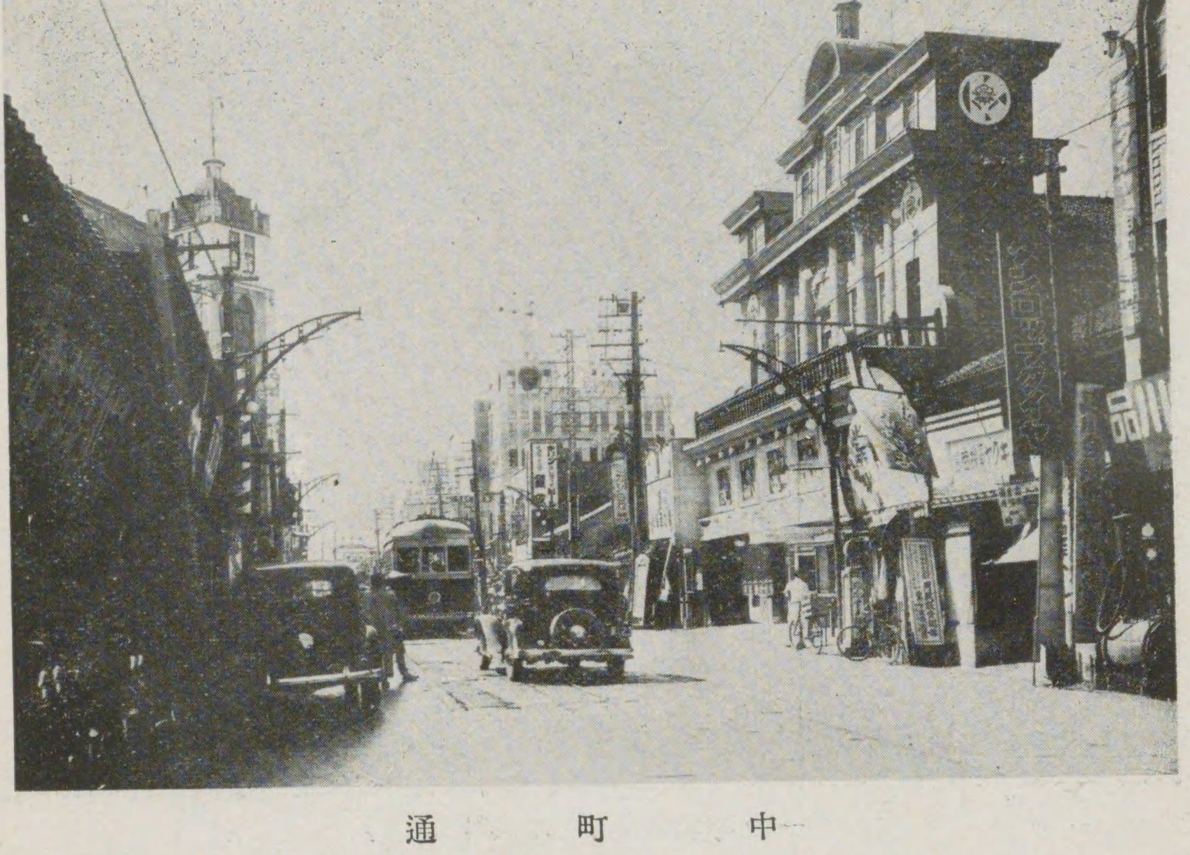 戦前の中町附近の様子。市電と自動車が走行する奥には、宮市大丸富山店の姿がある（港湾協会第九回通常総会富山準備委員会、『富山県の産業と港湾』、1936年（昭和11年）5月、港湾協会第九回通常総会富山準備委員会）